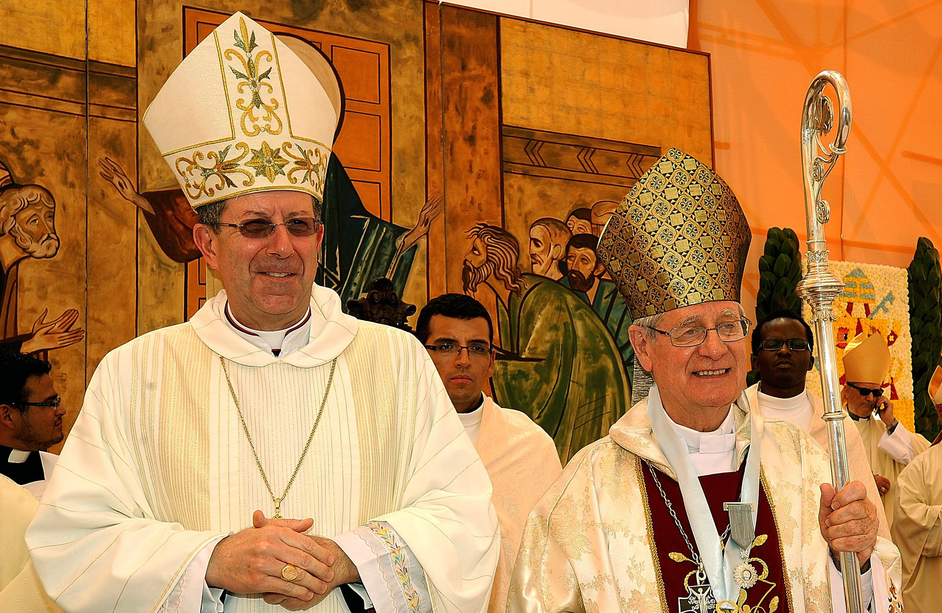 El Congreso de la República distinguió hoy con la Medalla de Honor, en el grado de Caballero, a monseñor Miguel Irízar Campos, ex obispo del Callao, que recientemente culminó sus funciones en la diócesis del vecino puerto por límite de edad. Encargado de imponerle la distinción fue el congresista por el Callao, Rogelio Canches Guzmán, titular de la Comisión de Relaciones Exteriores, en representación del Presidente del Congreso, Daniel Abugattás Majluf.